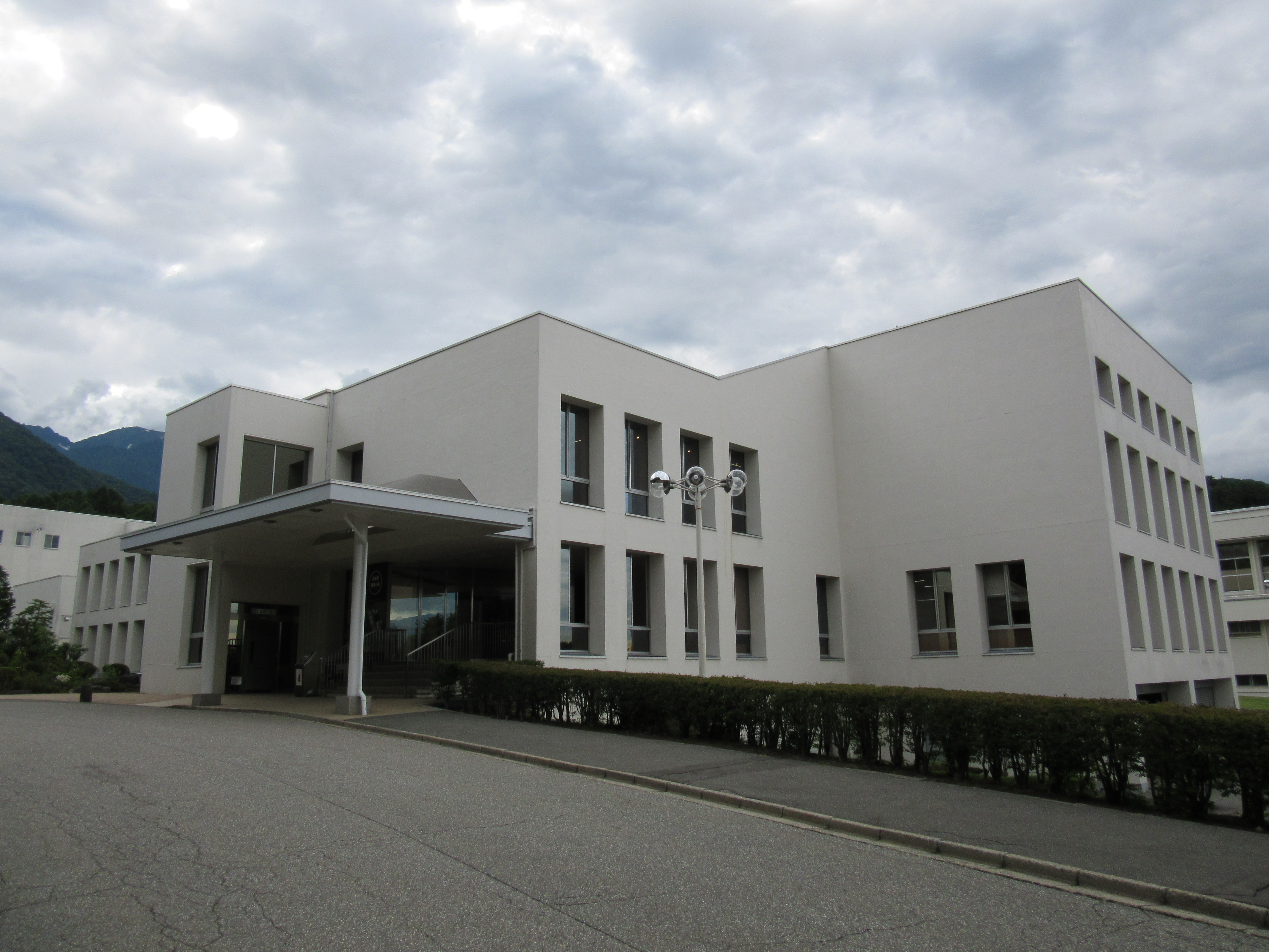 養命酒製造駒ケ根工場